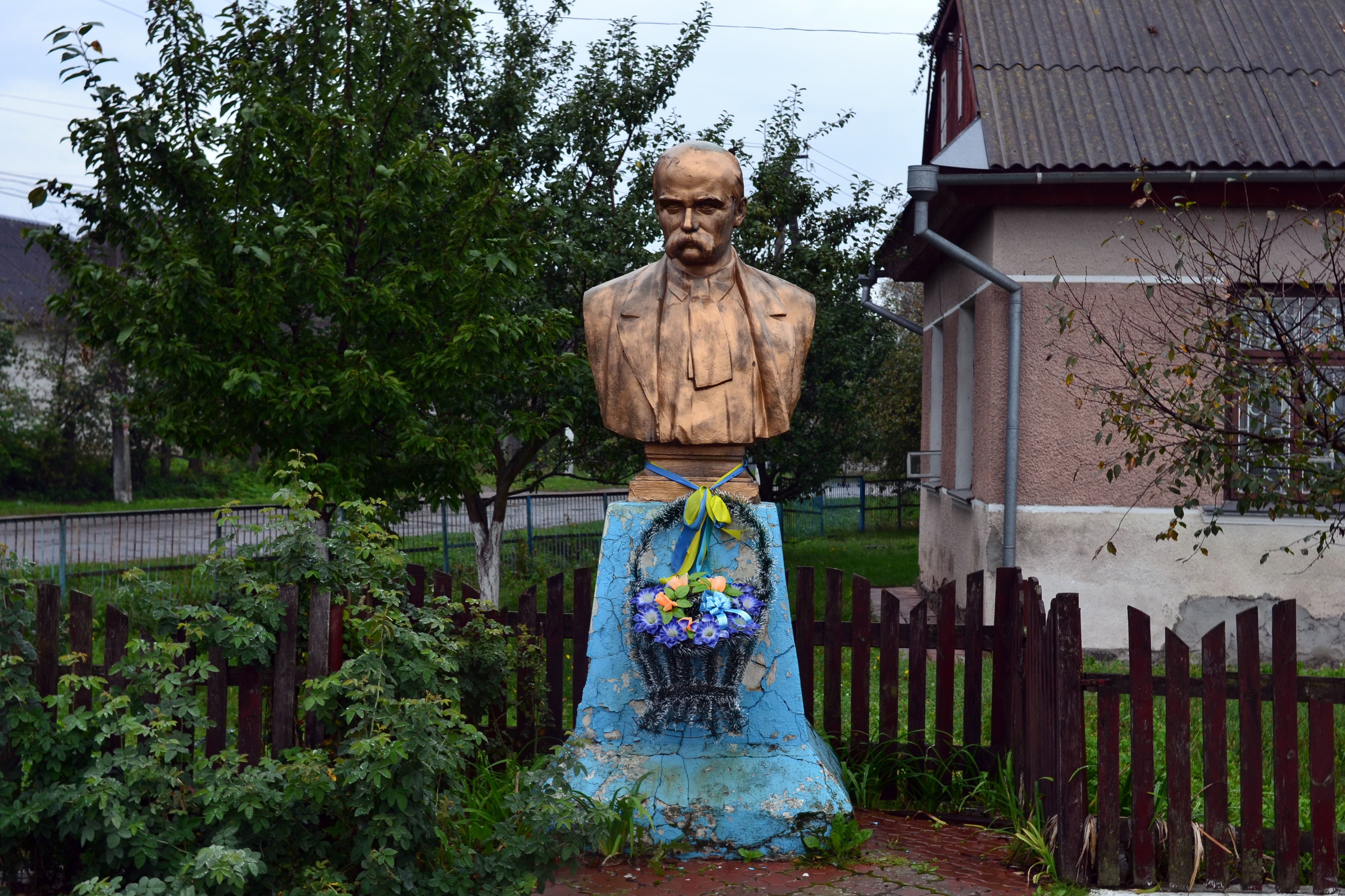 Пам’ятник Т.Г.Шевченку (1955 рік) - Дубове (початок вул. Шевченка) Ковельський район Волинська область Україна